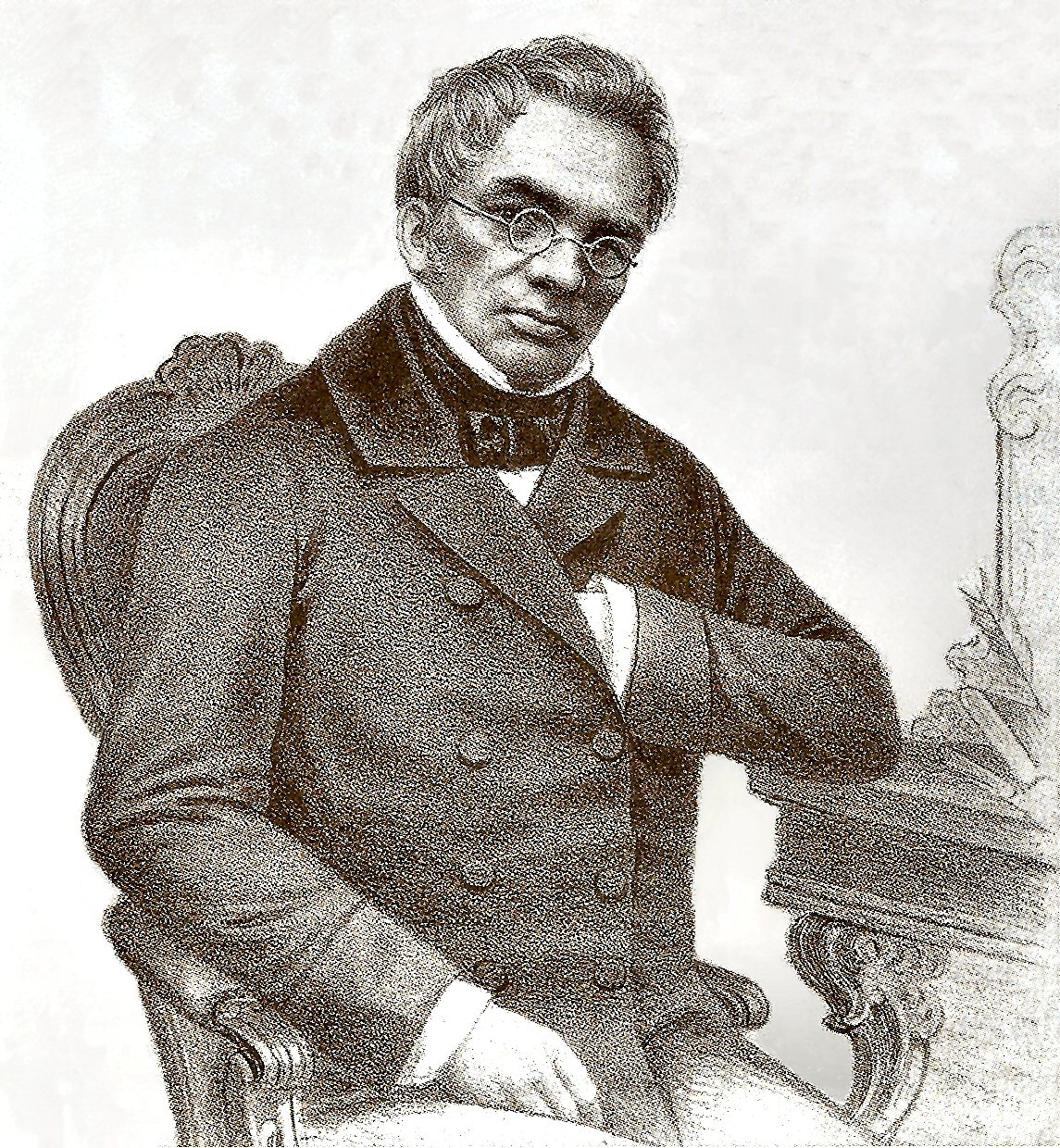 Портрет Н.И. Греча (1787-1867) - российского литератора и издателя